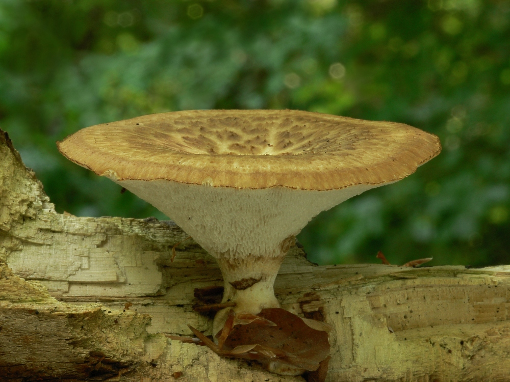 Sklerotienporling Polyporus tuberaster